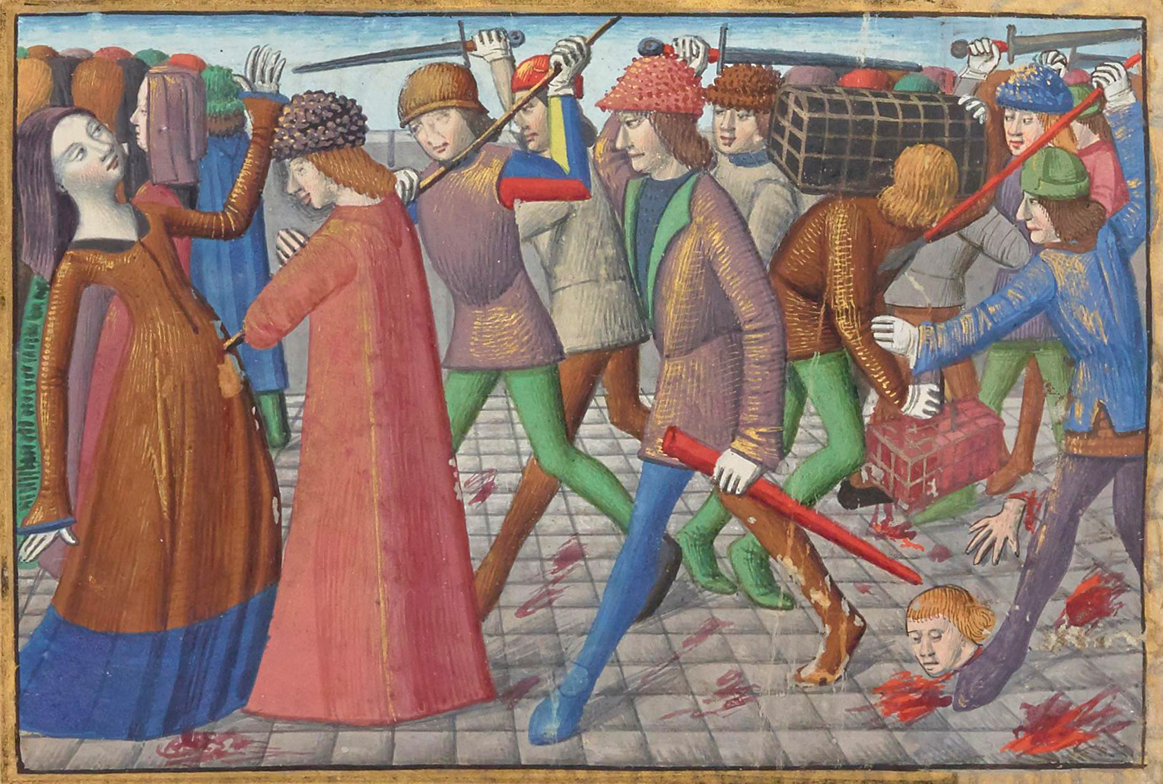 Massacre des habitants de Paris en 1413.